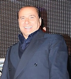 Silvio Berlusconi